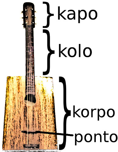 Kabosia partoj